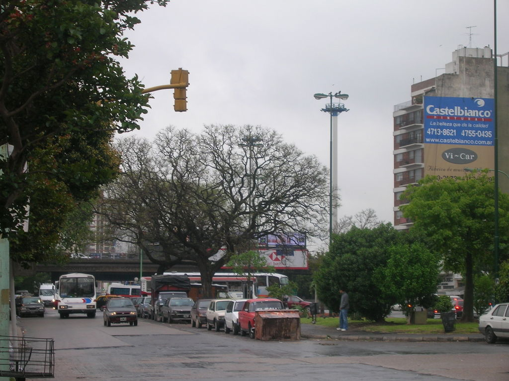 Foto del Barrio de Saavedra, Bulevar San Isidro, próximo al Puente Saavedra